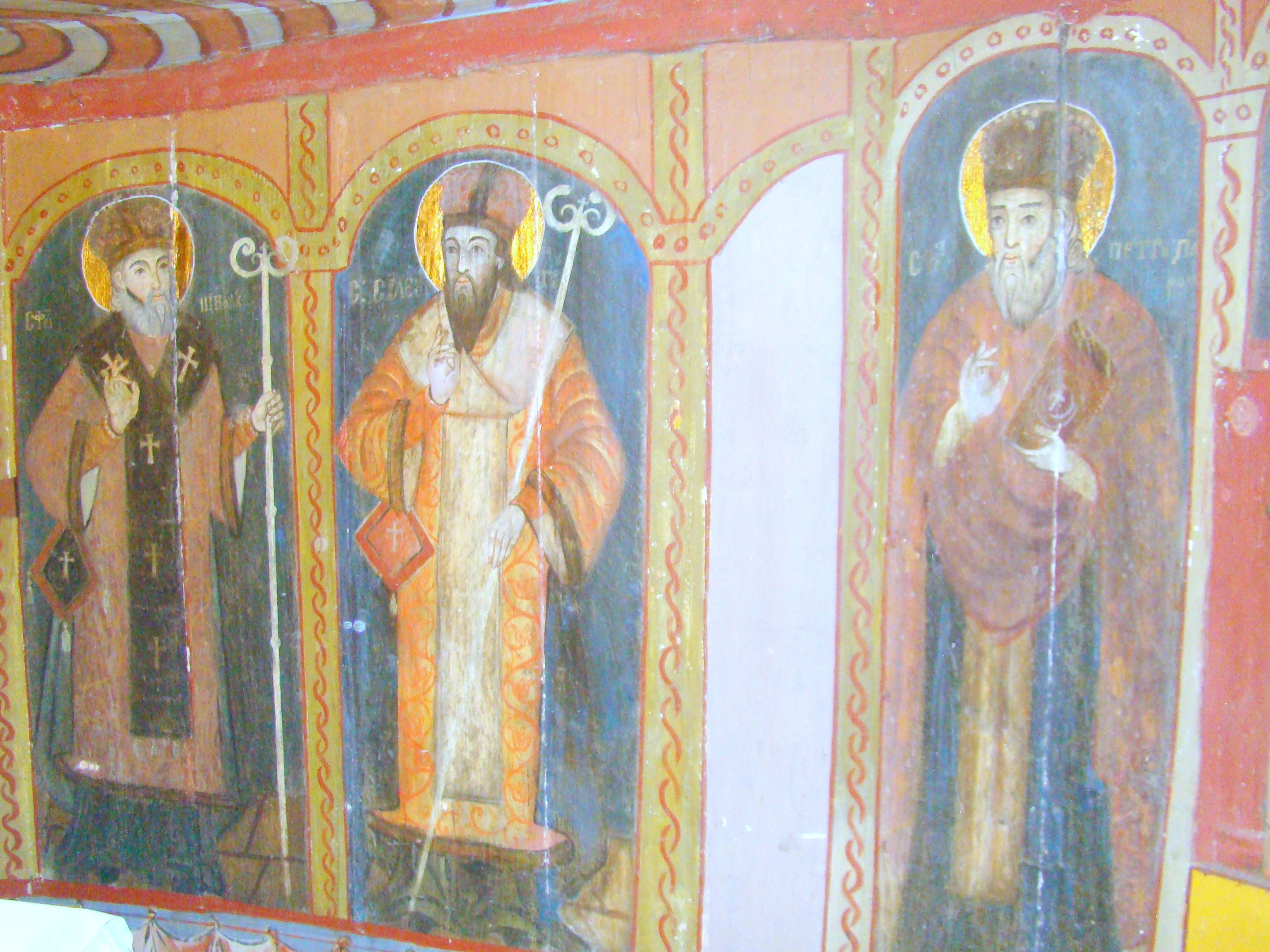 Biserica de lemn „Sfinții Arhangheli” din Năsal